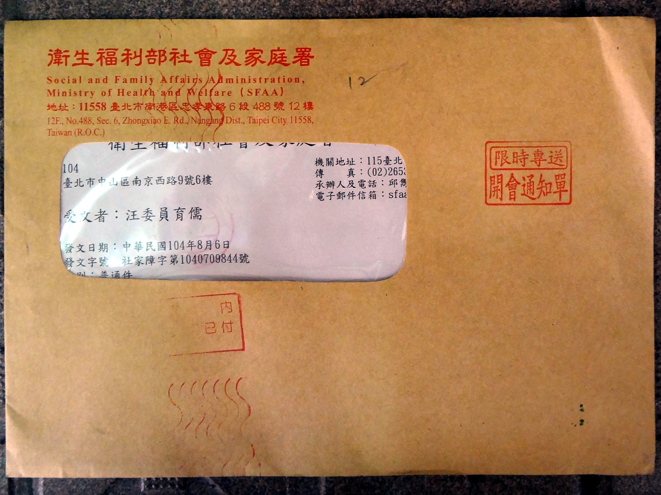 2015年中華民國衛生福利部社會及家庭署公文封。